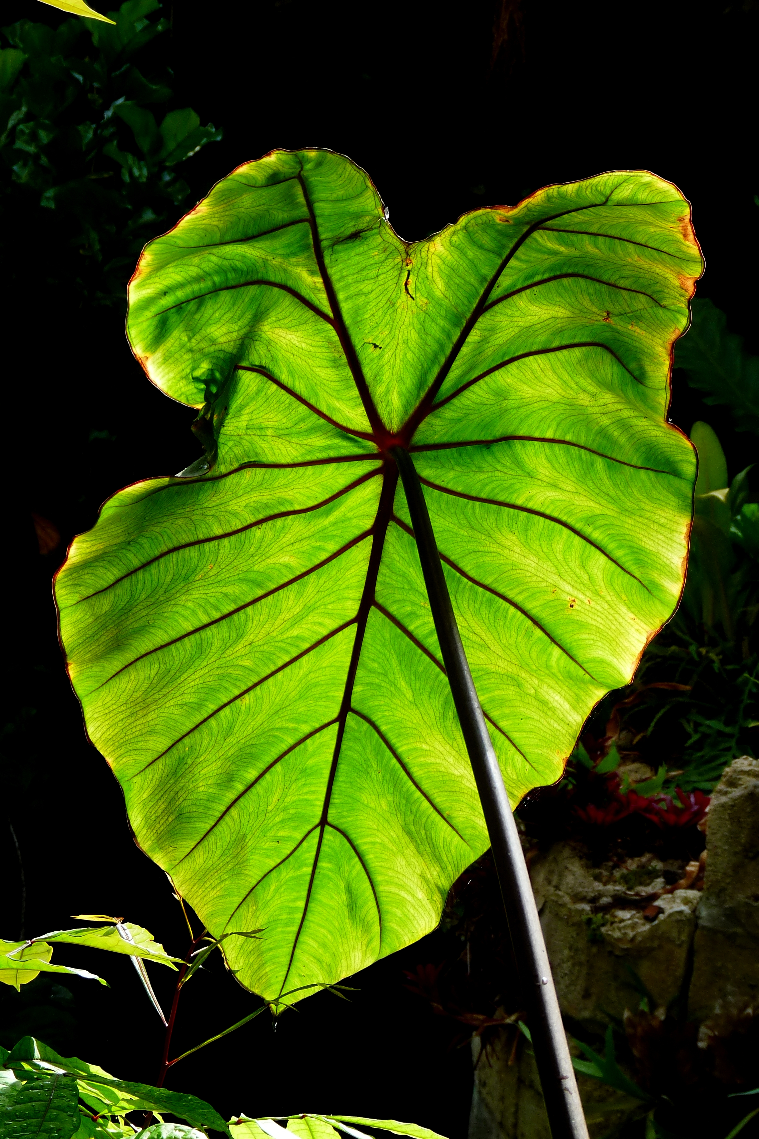 NICE Parc Phoenix: Contre-jour d'une feuille (cf. Colocasia).